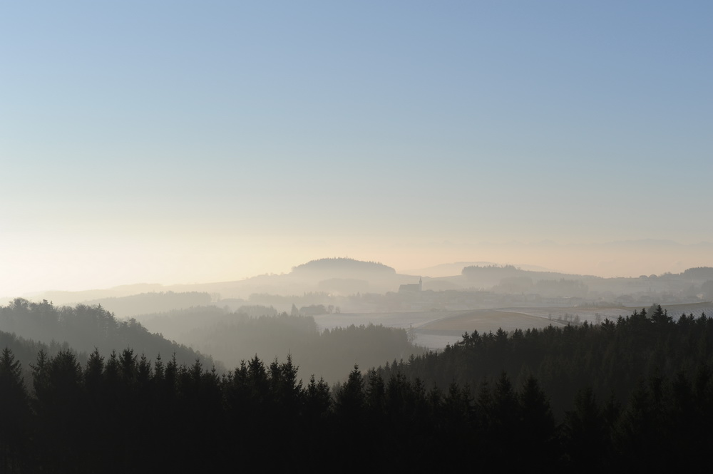 Altenberg im Dezember 2007, ca. 9:00 morgens. Aus Richtung Reichenau kommend fotografiert.